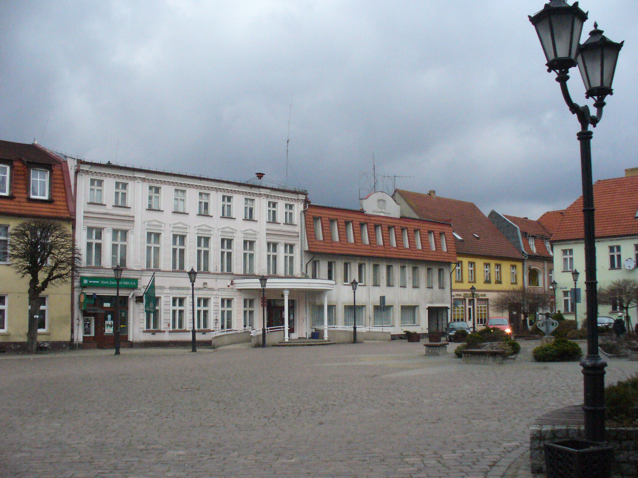 Rynek Miejski